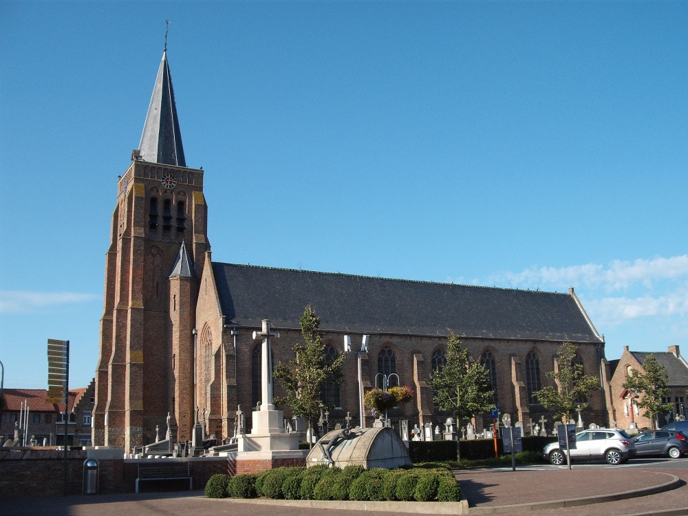 Eglise de Dranouter